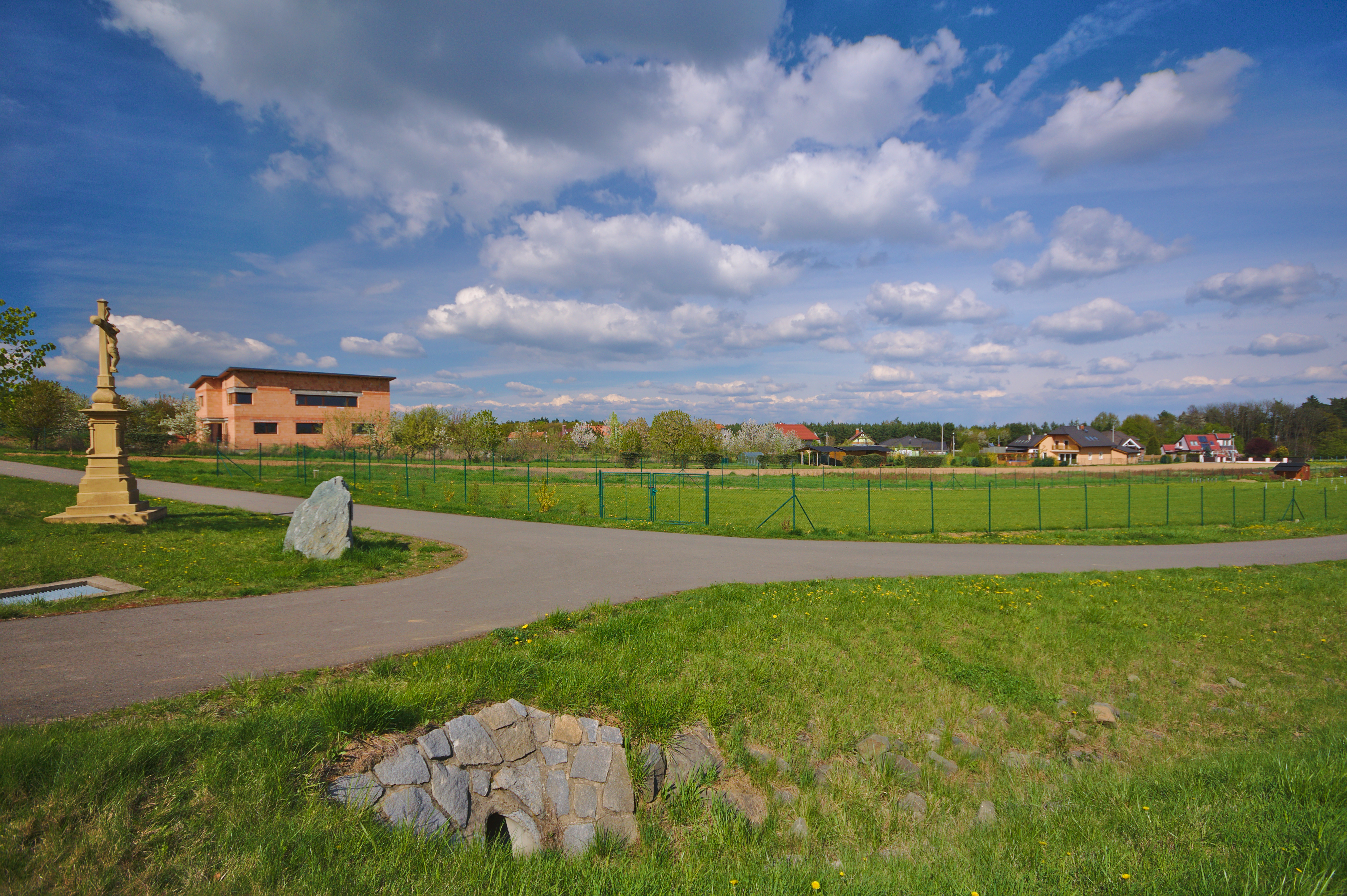 Pohled na obec od jihu, Vincencov, okres Prostějov